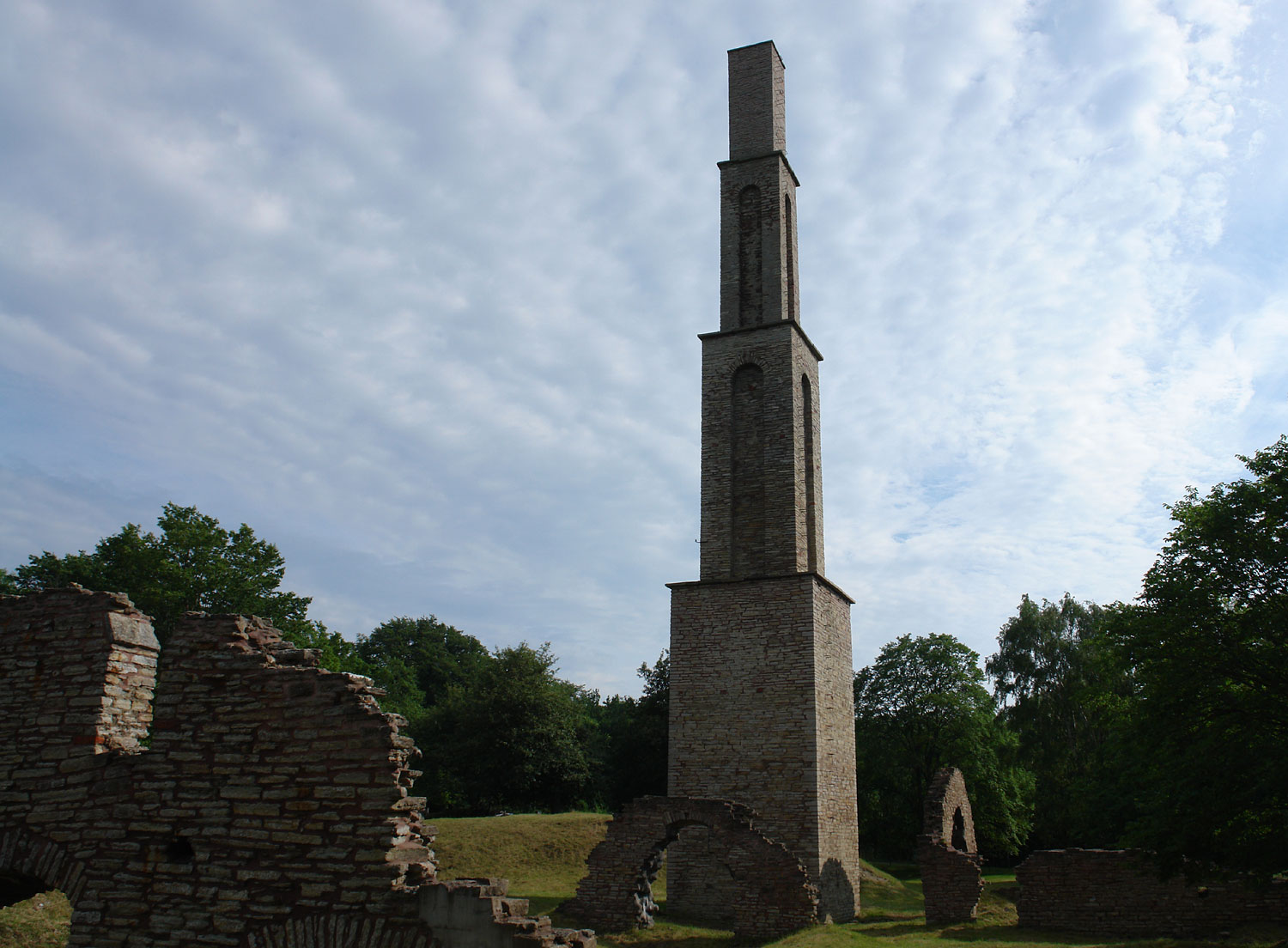 Alaunwerk Oland - Södra bruket. Überreste des 1804/06 gebauten Werkes (Teil des Kulturerbes).